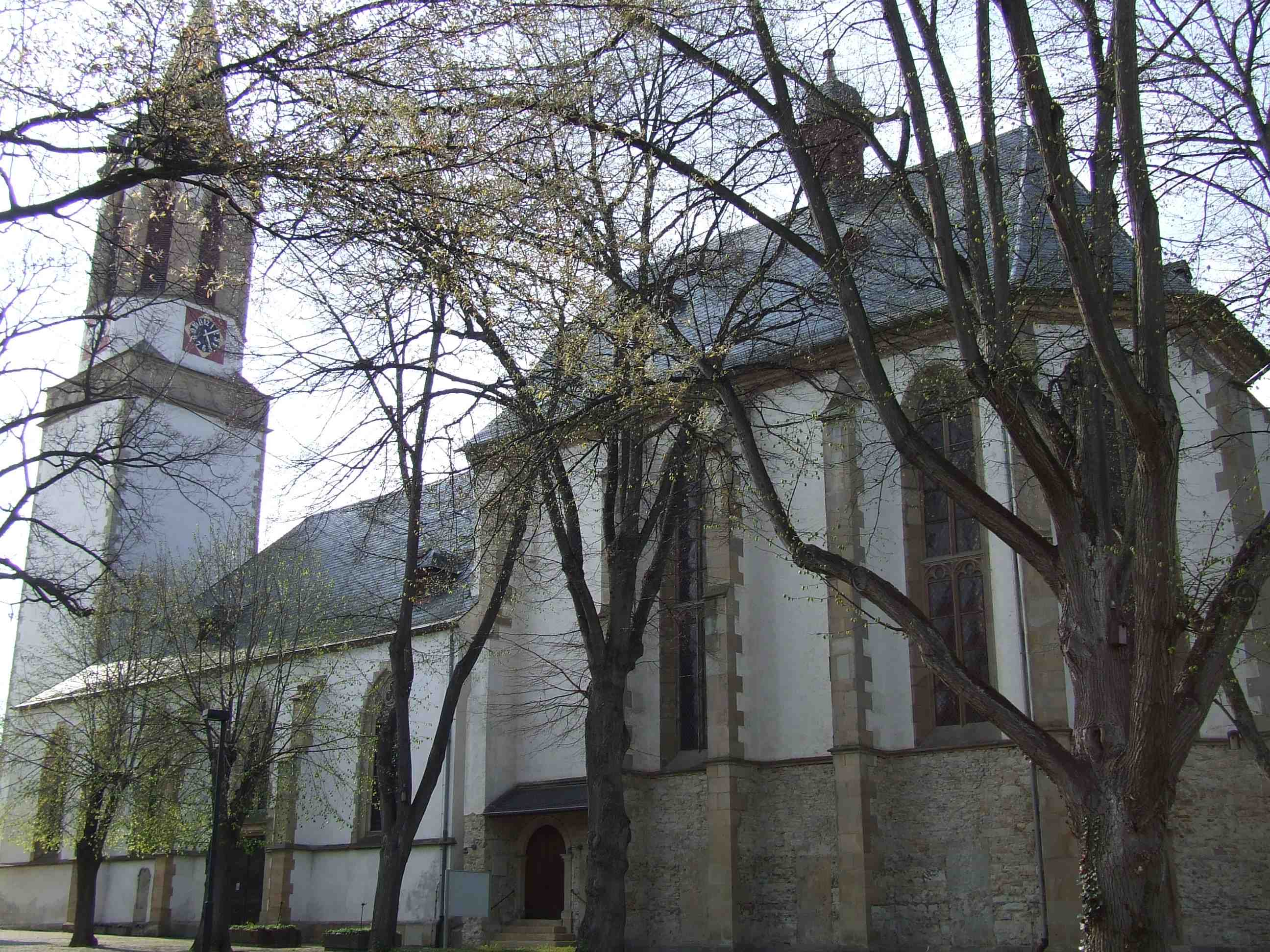 Simultankirche in Gau-Odernheim. Links: Kirchturm, Mitte: evangelisch (niedriger Bau), Rechts: katholisch (hoher Bau)